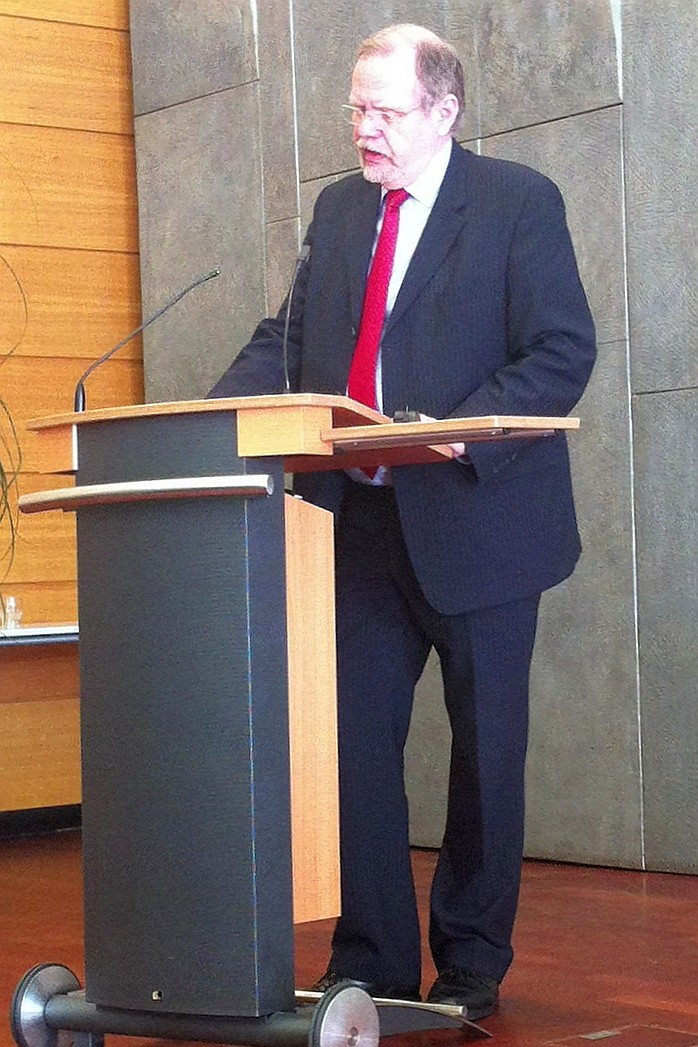 Professor Michael Beintker bei einem Vortrag anlässlich des Pfälzischen Pfarrerinnen- und Pfarrertags am 4. März 2013 in Kaiserslautern.